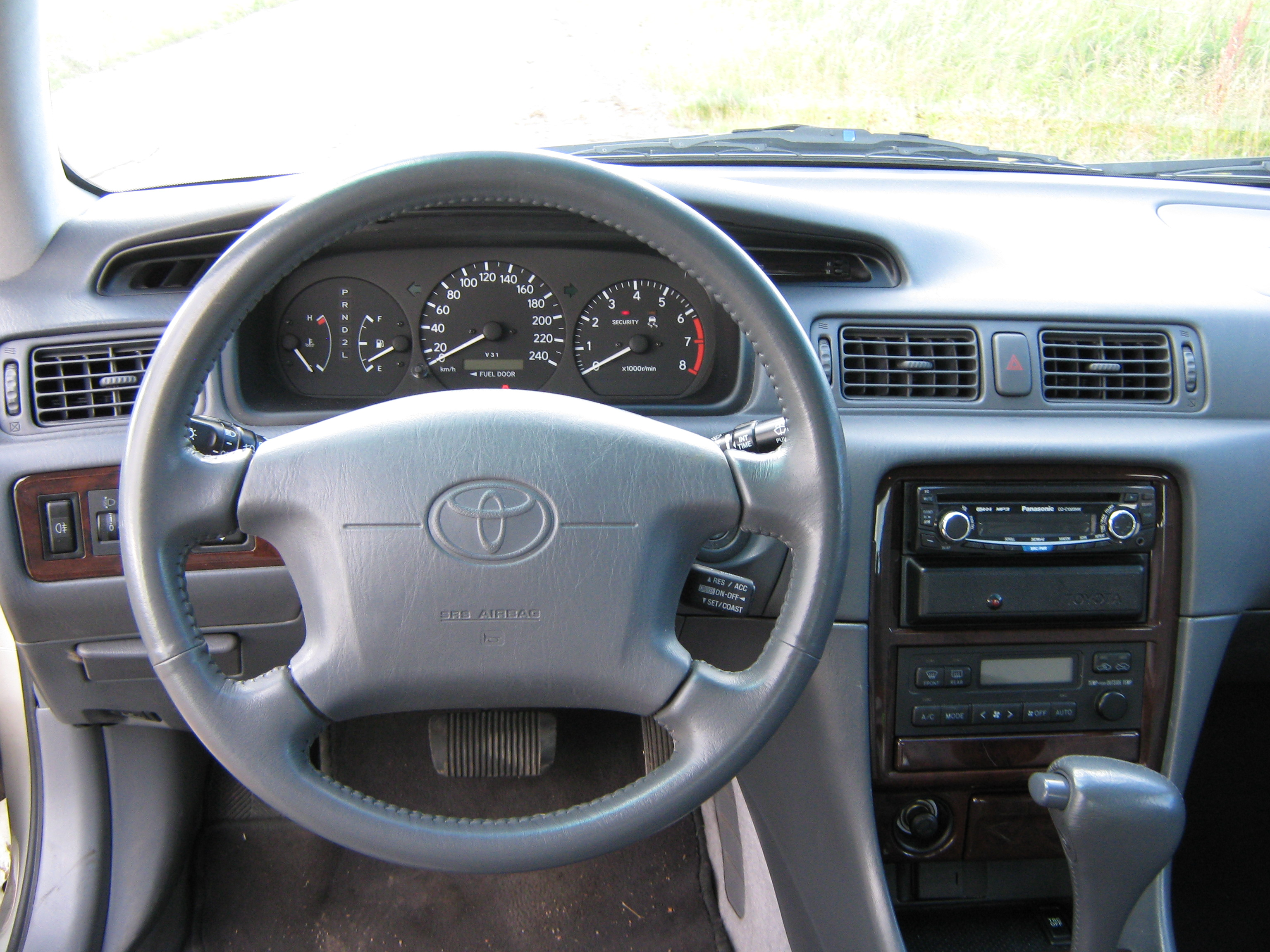 Instrumentpanelen på en Toyota Camry från 2000